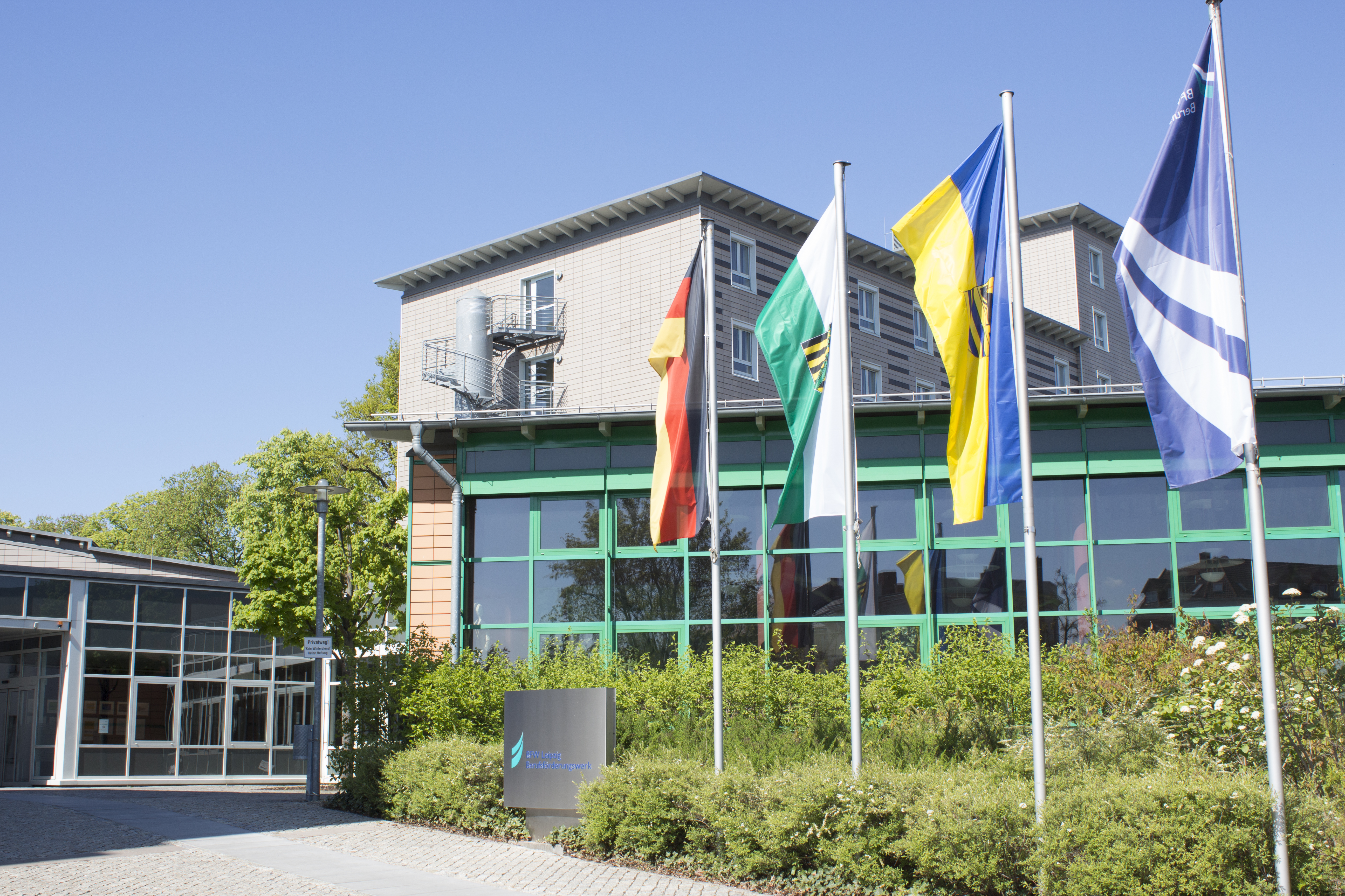 Ansicht des Berufsförderungswerks Leipzig, Haus 3.